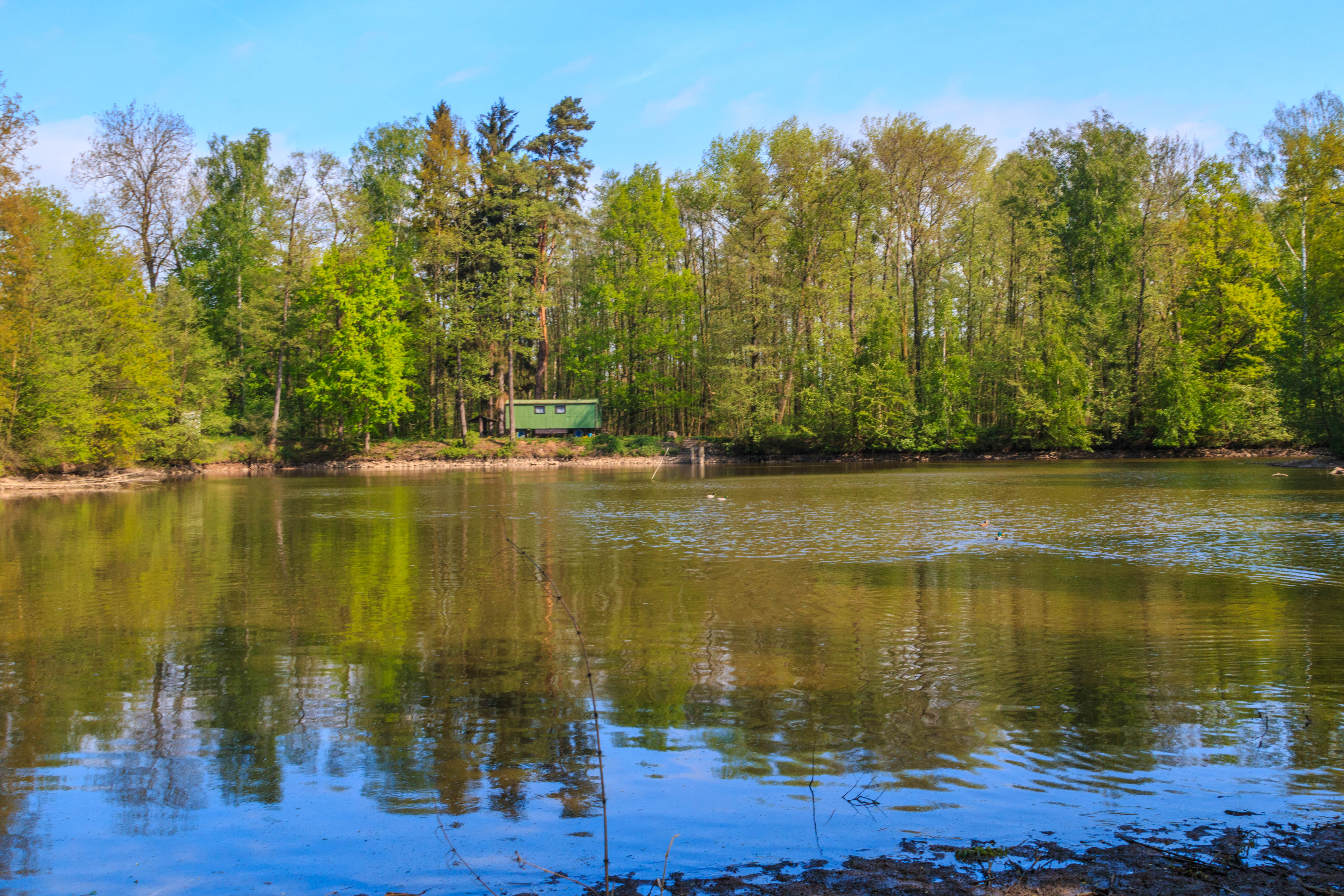 Kamenný rybník v osadě Ledec Project: Vodstvo.